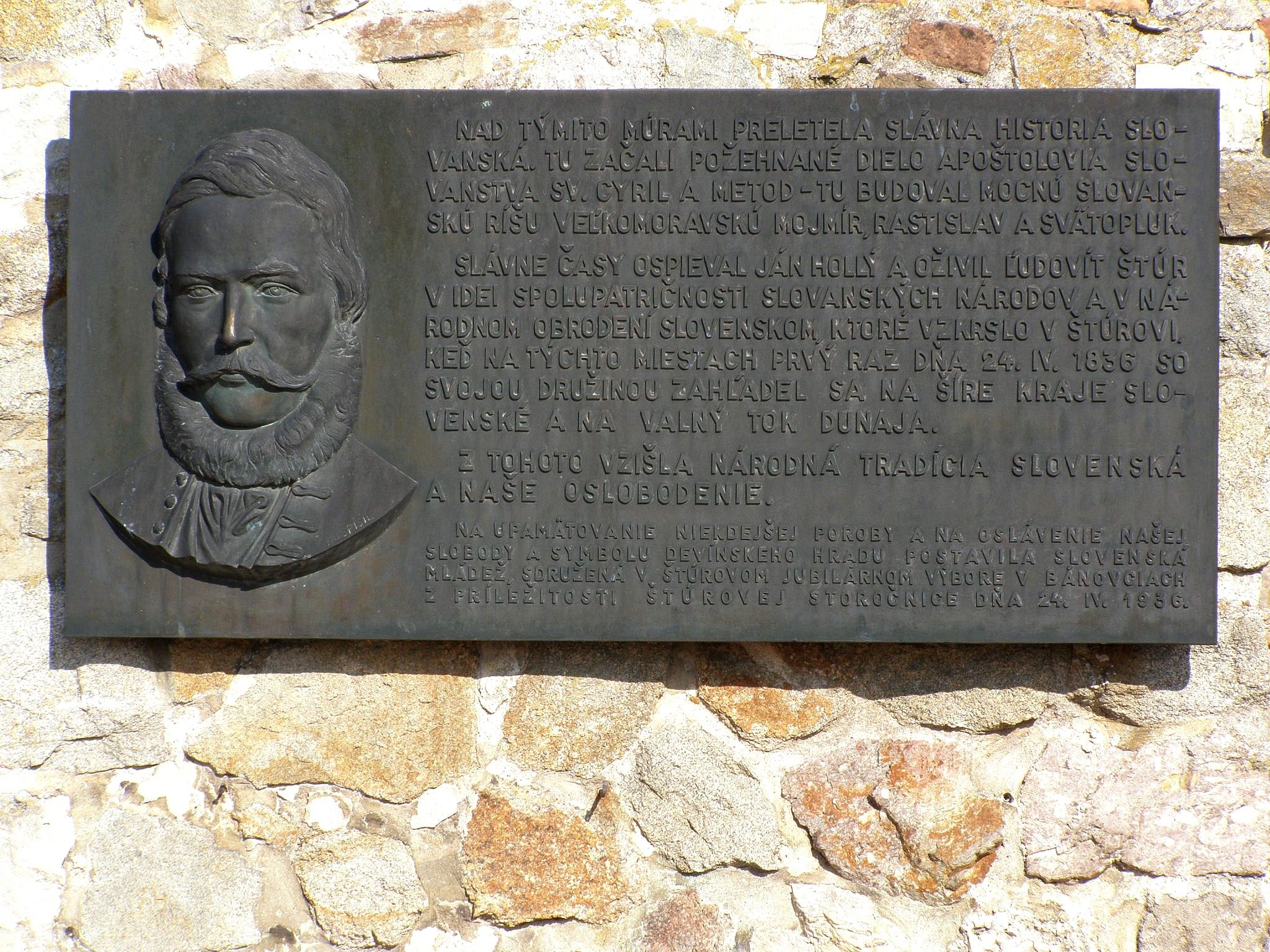 Pamätná tabuľa z roku 1936, osadená pri príležitosti 100-tého výročia výletu štúrovcov na Devín 24.4.1836. Autorom diela je bratislavský sochár Jozef Pospíšil